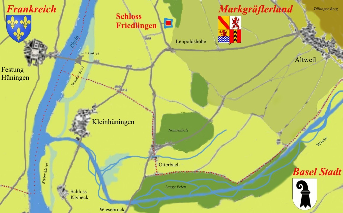 Map of Area Festung Hüningen, Burg Friedlingen